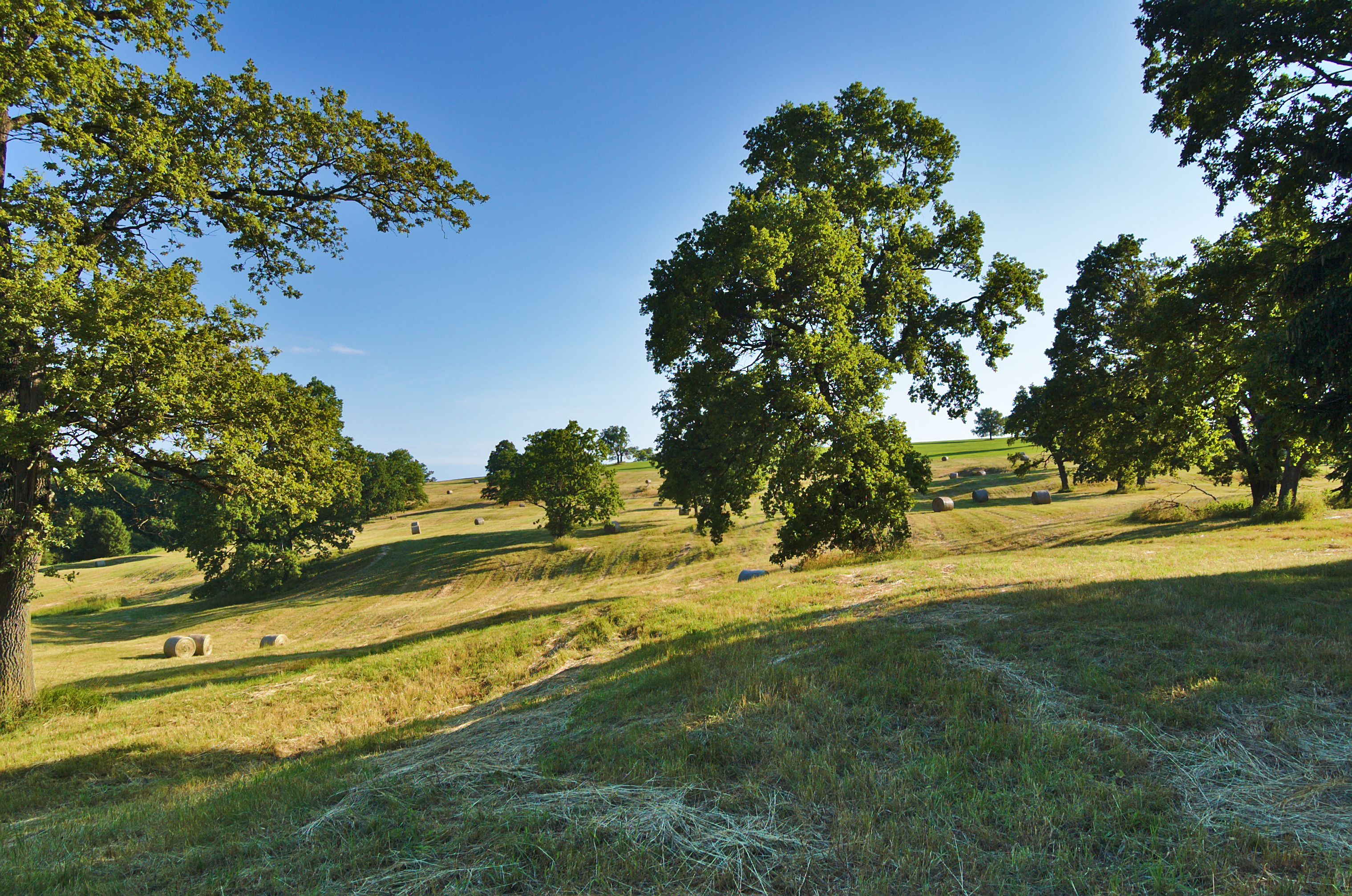 Kopec Lesná, okres Uherské Hradiště